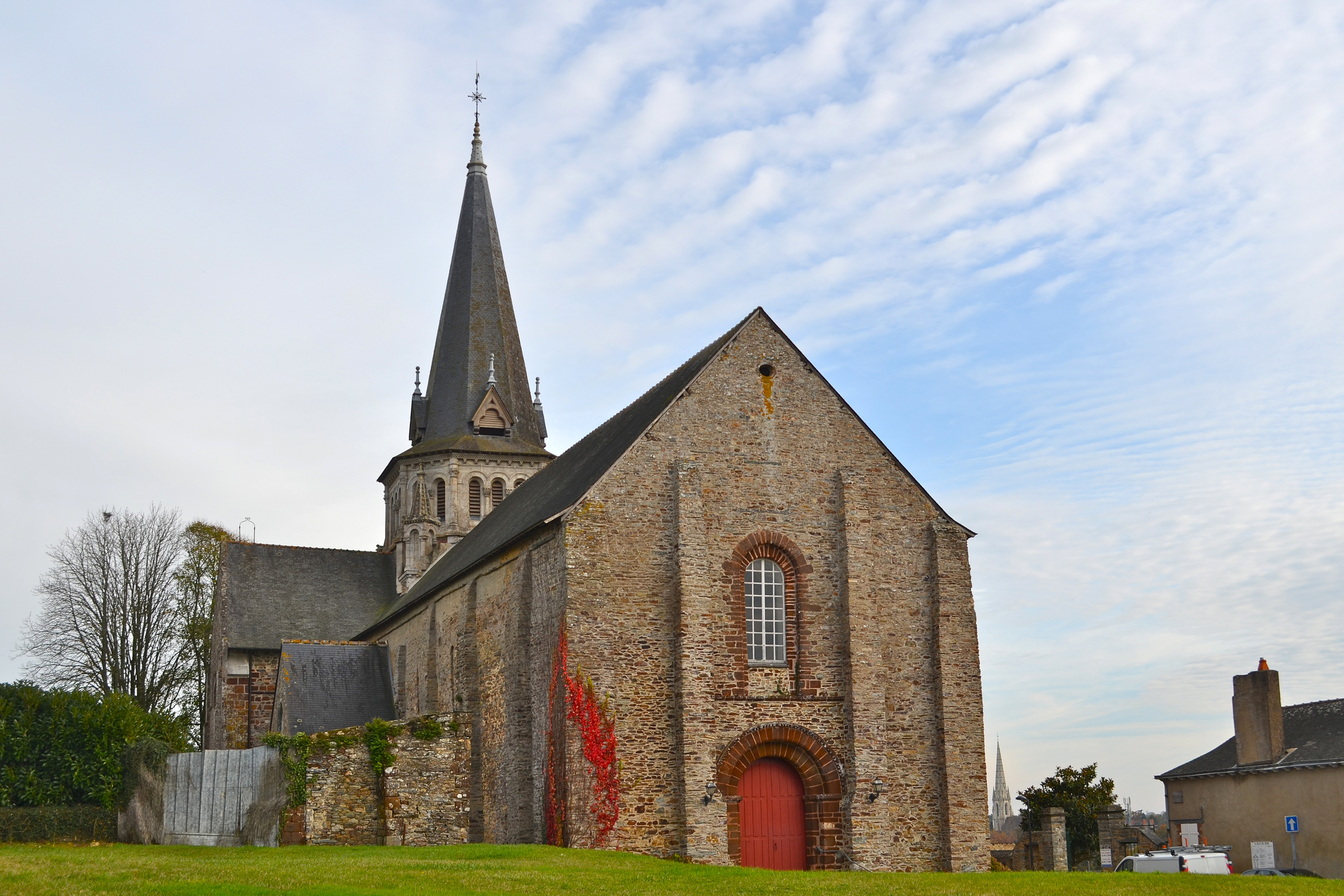 Eglise Saint-Jean de Béré - Châteaubriant (Loire-Atlantique)